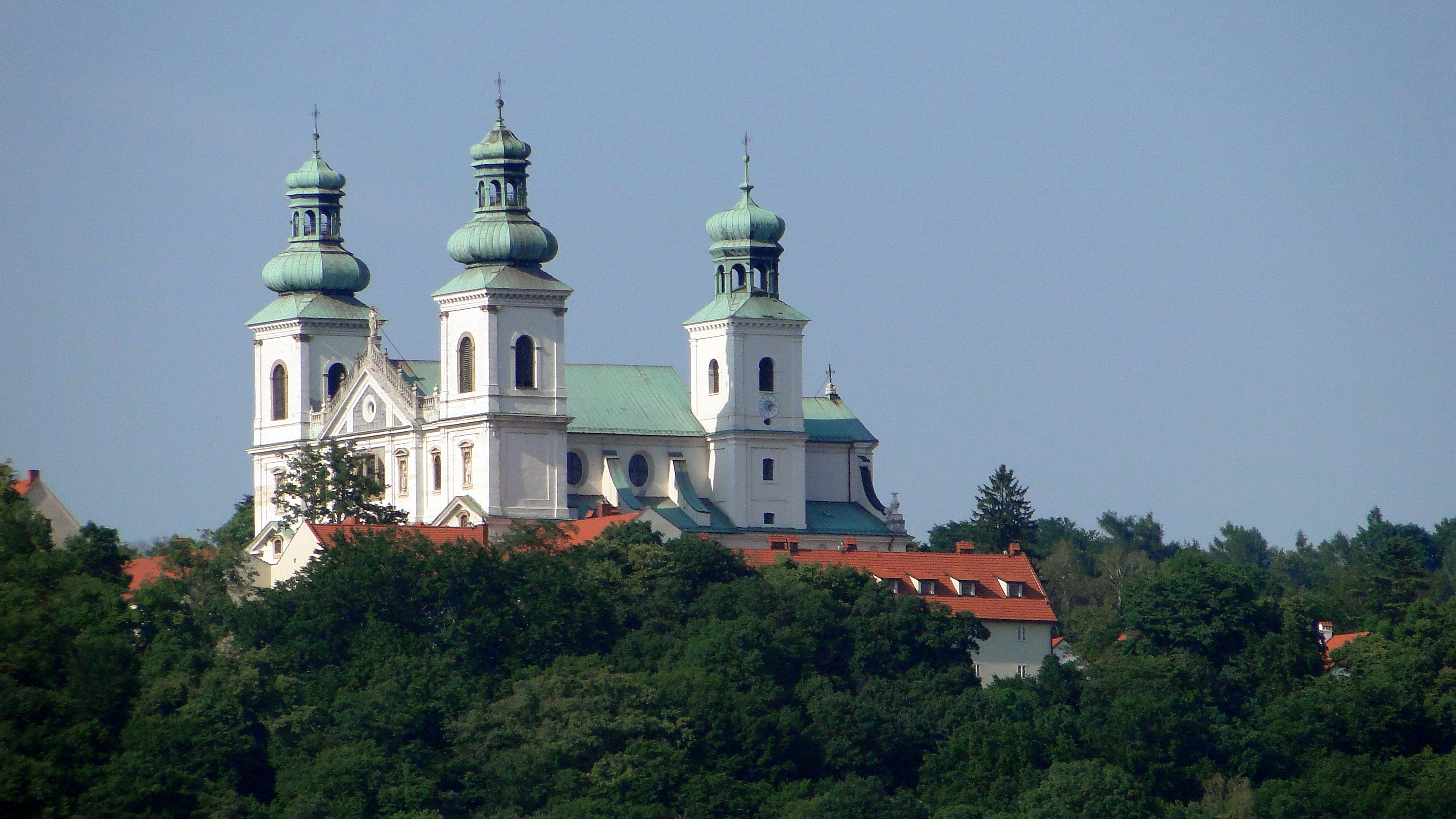 Kościół Kamedułów widziany z Tyńca